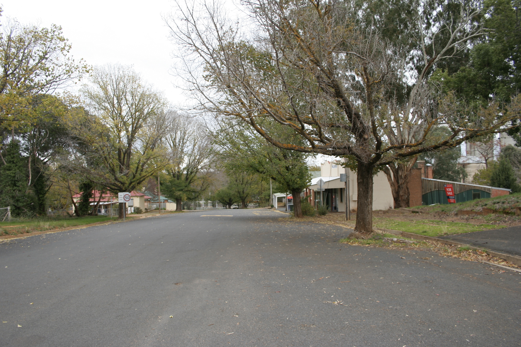 Wallendbeen